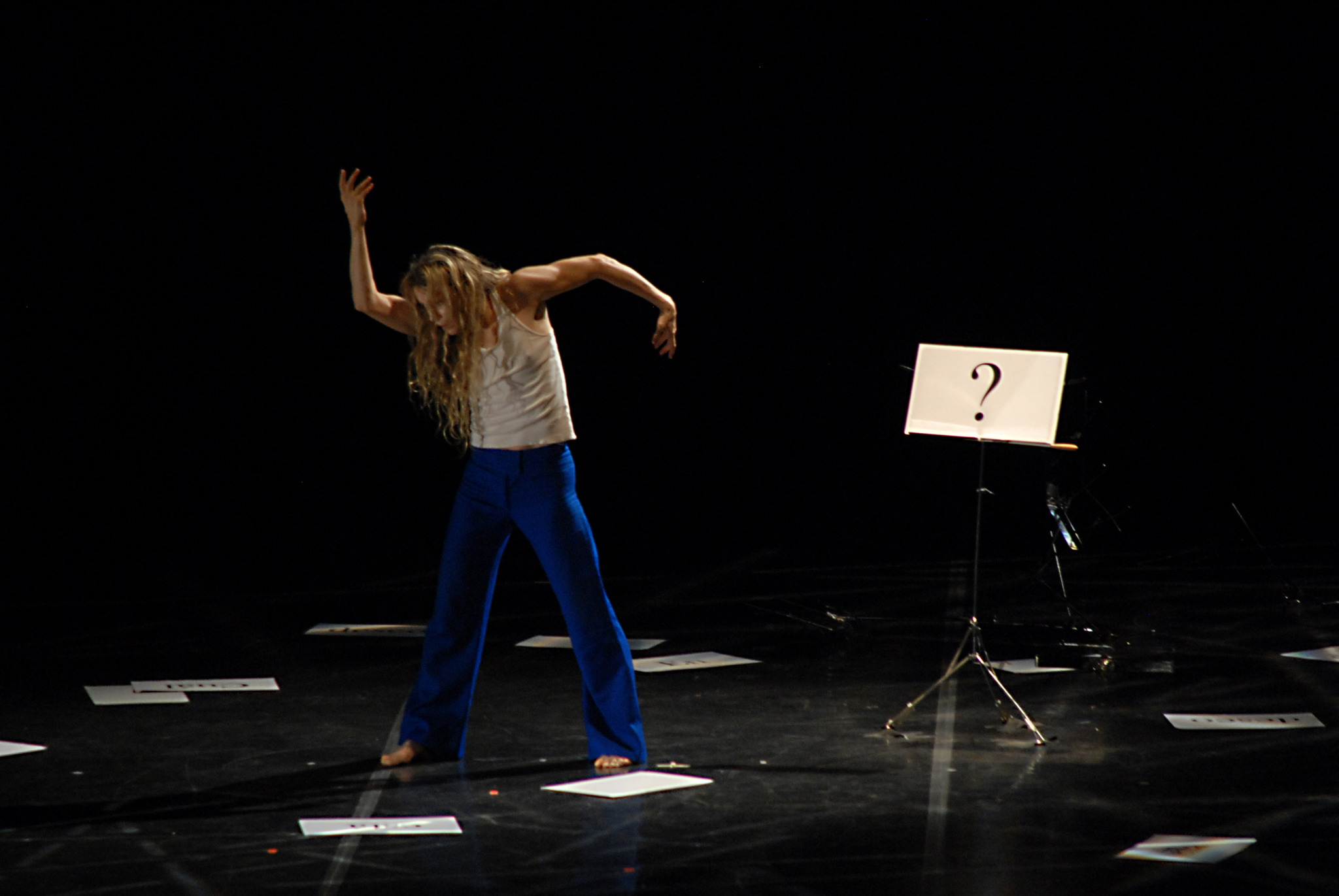 Louise Lecavalier "Fou glorieux" Quebec, Canada About Louise Lecavalier